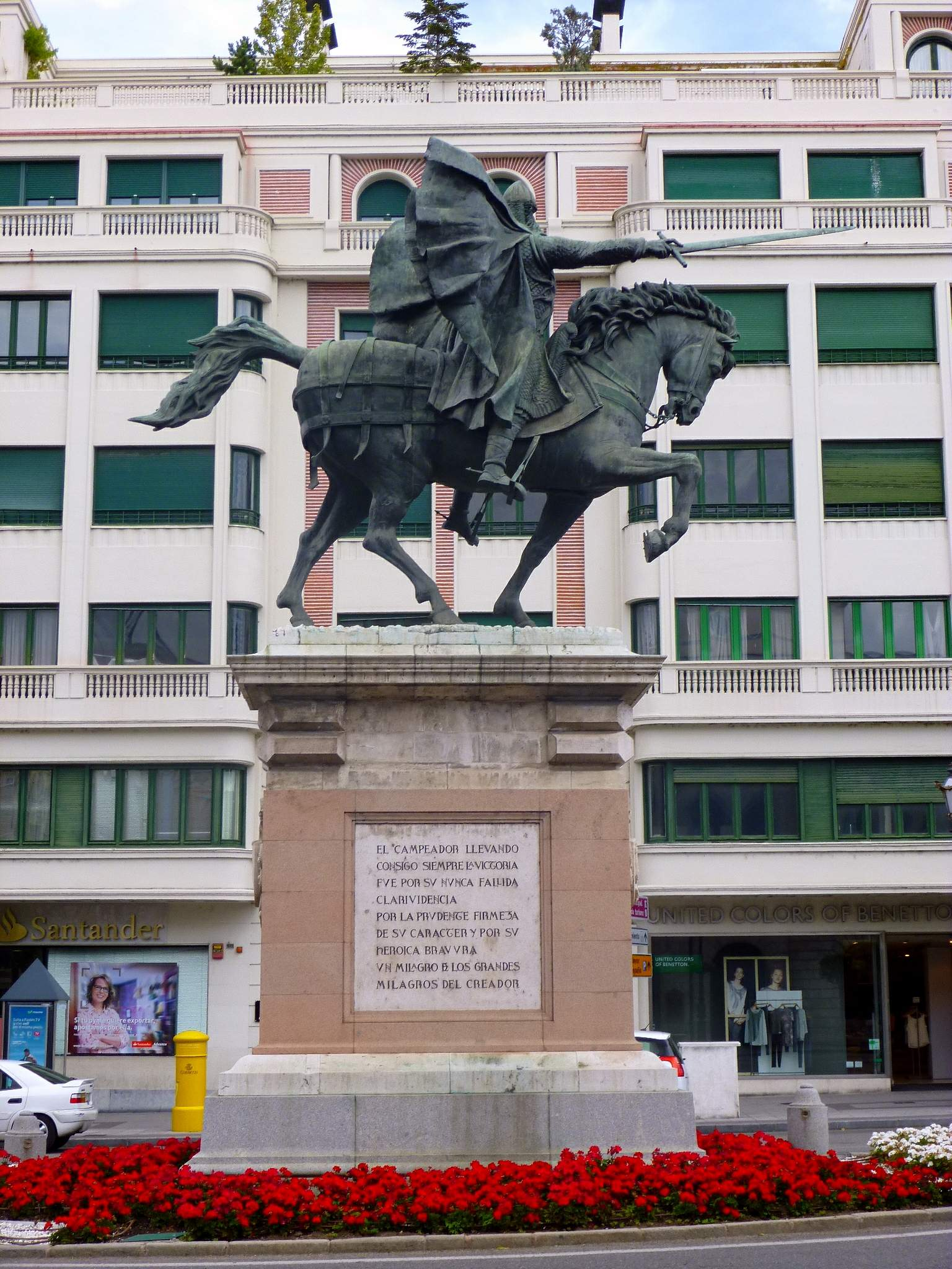 Estatua del Cid (Burgos)